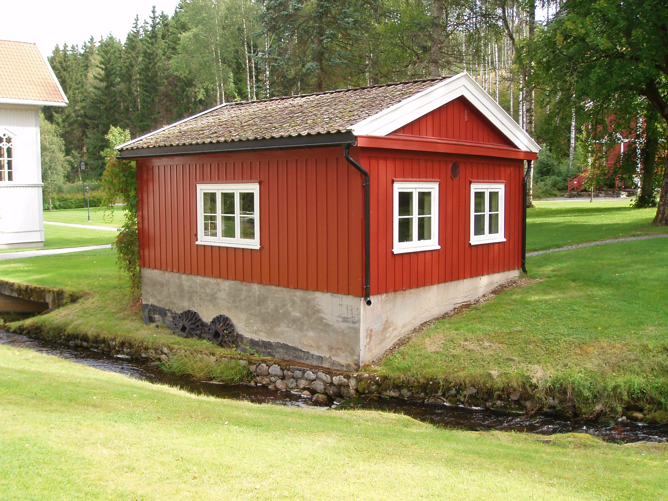 Eidsverket kraftstasjon i Eidsbekken, på Bjørkelangen i Aurskog-Høland kommune.